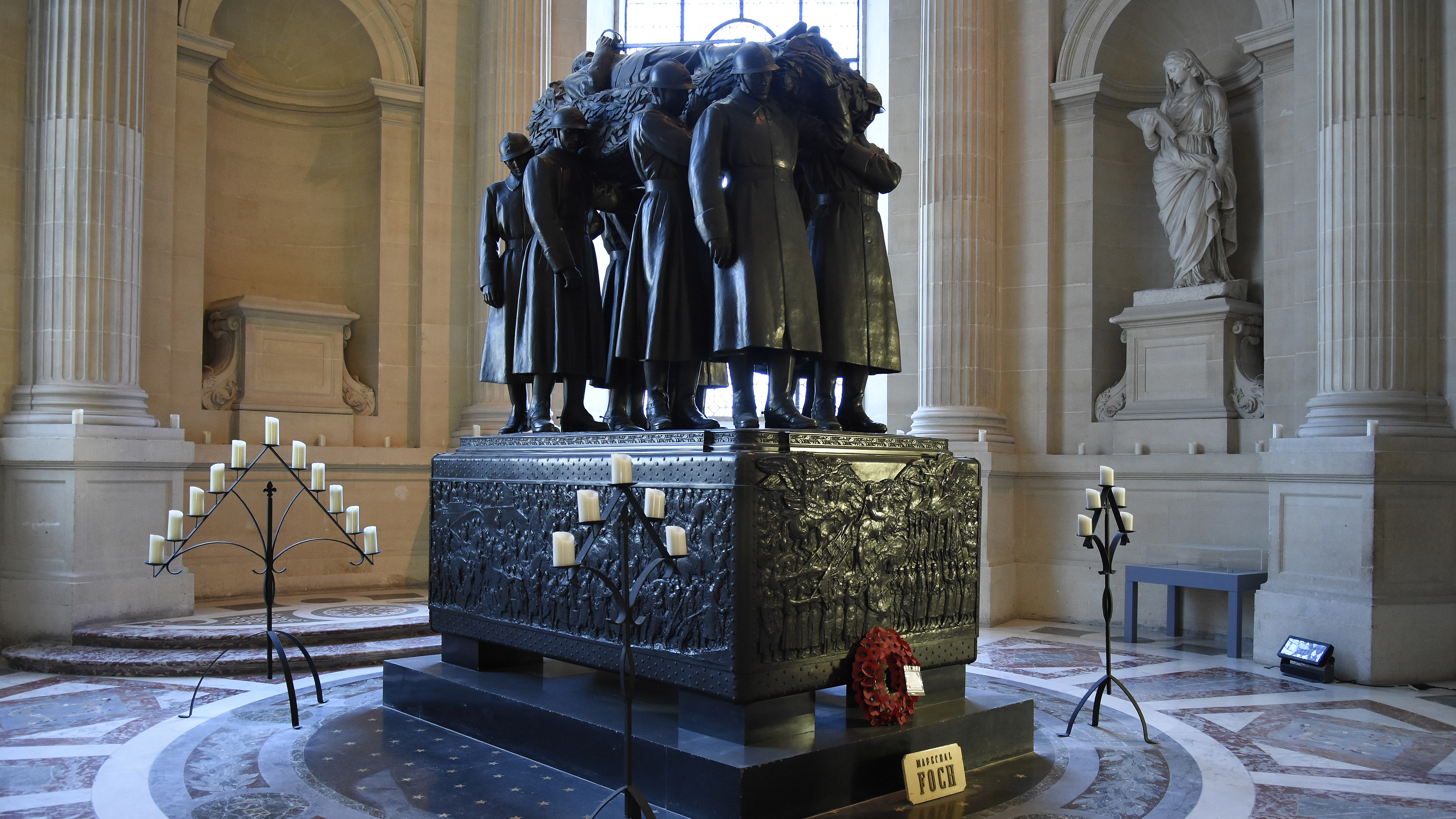 Graf van Ferdinand Foch - Dôme des Invalides - Parijs